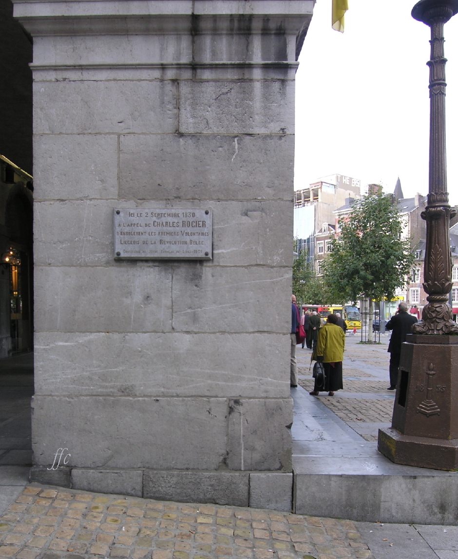 Memorial Plaque Belgian Revolucion - Liege - 1830